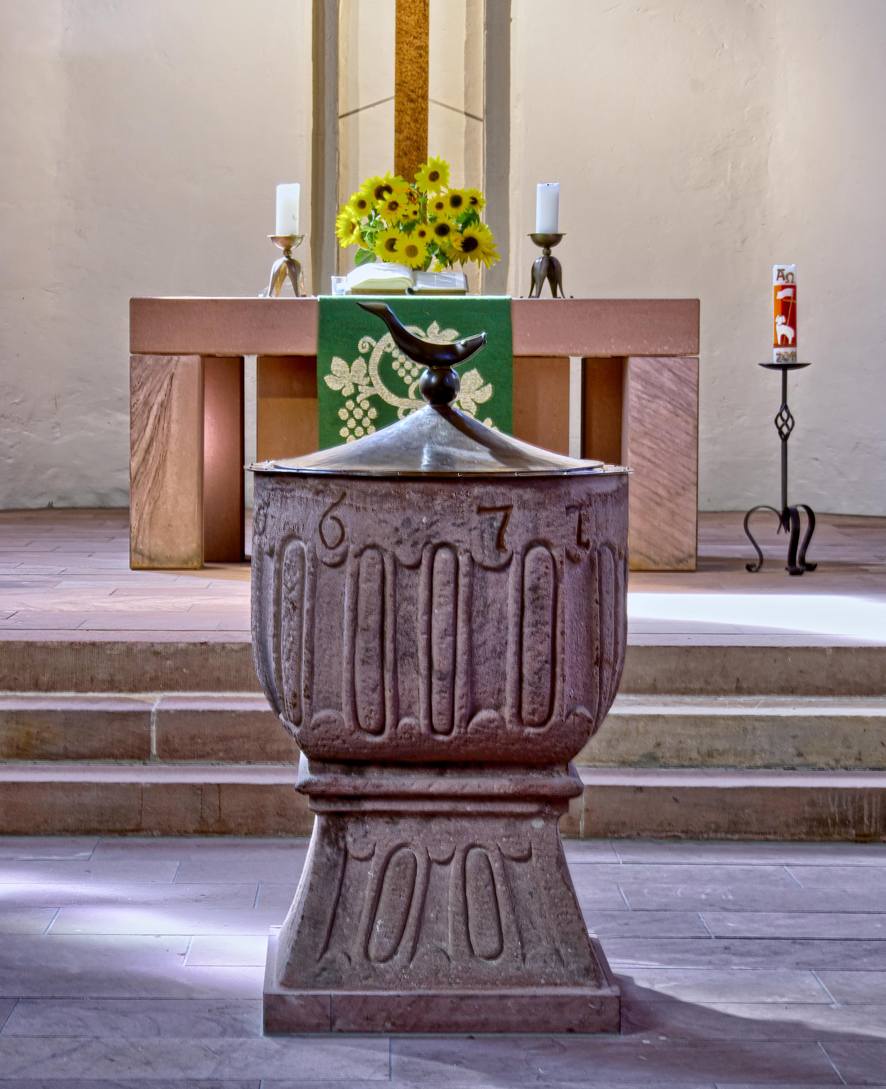 Bergkirche Nimburg, Innenansichten